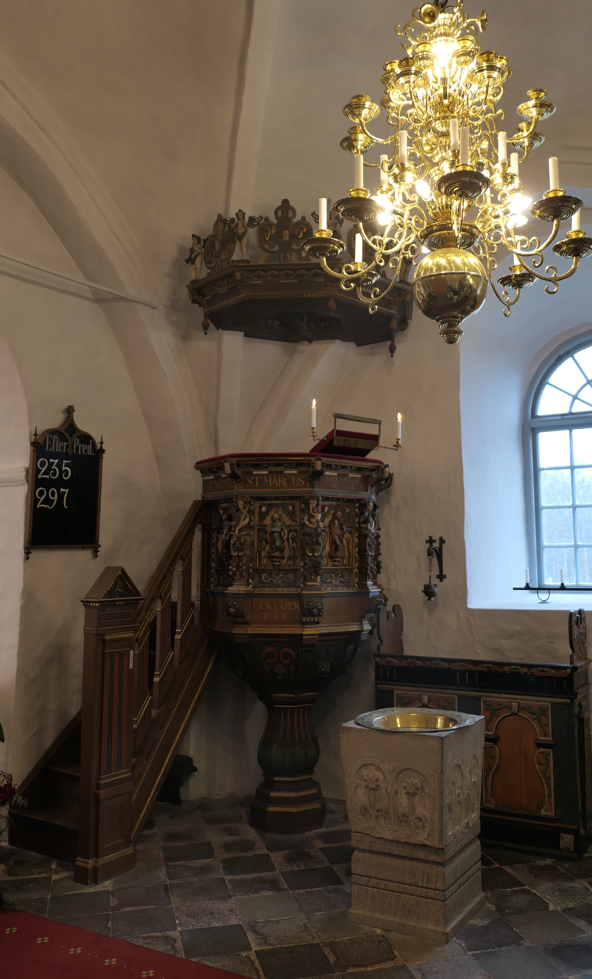 Predikstol och dopfunt Gärdslövs kyrka